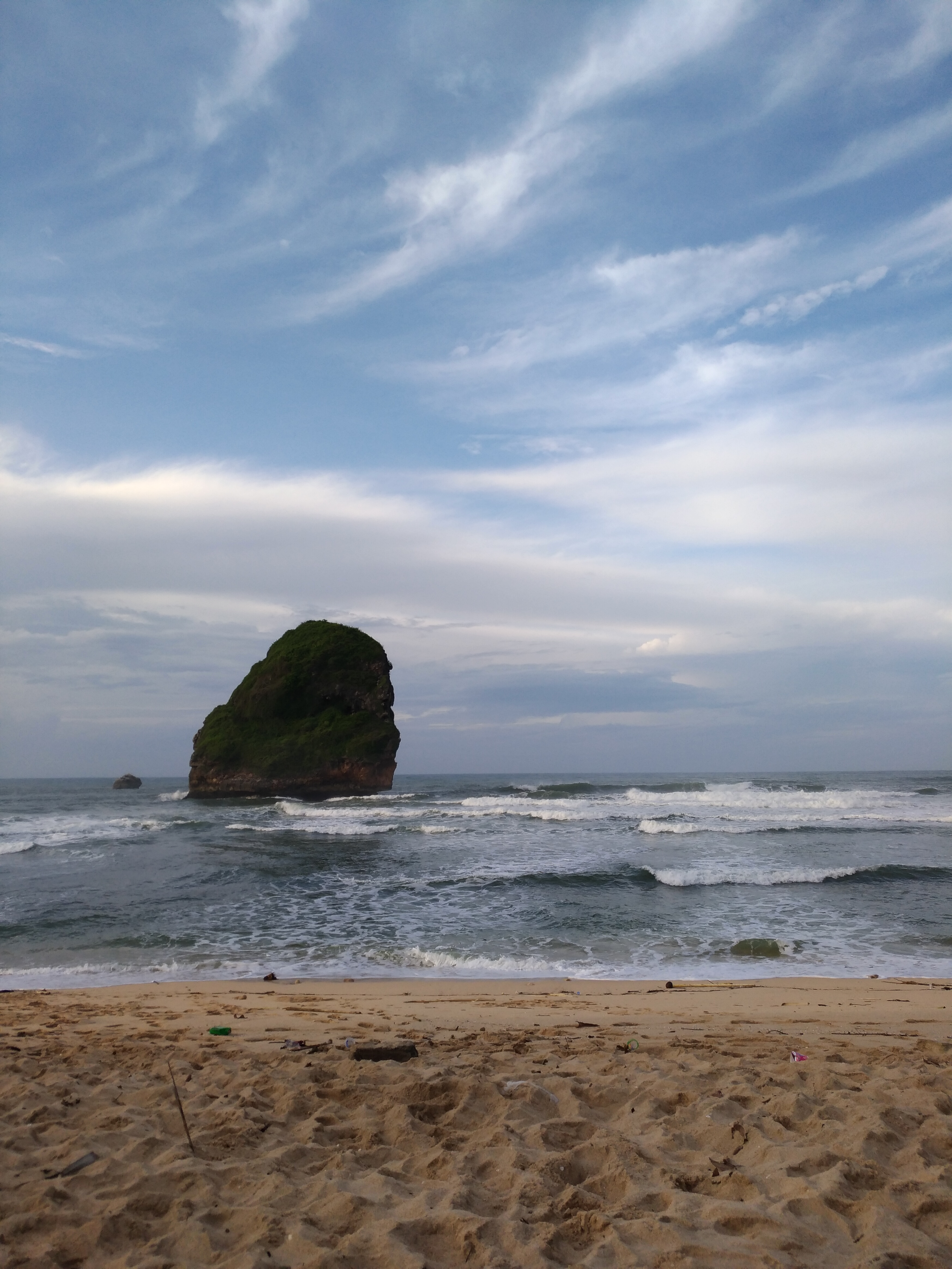 Pemandangan di pantai Goa Cina, dengan batu berwajah yang menghadap kearah timur pantai.